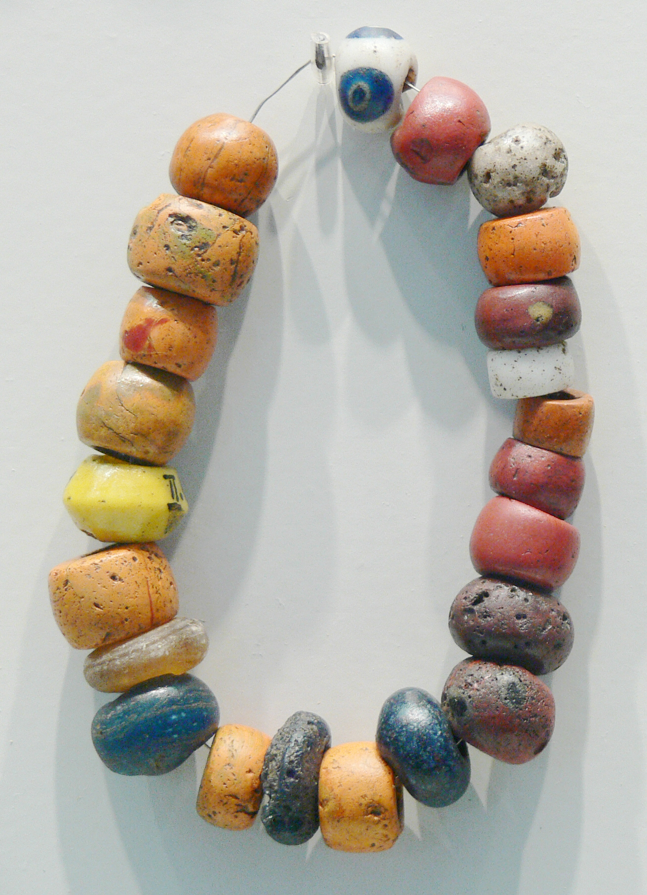 Perlenkette, 3.-4. Jh. n. Chr.; Fundort: Jucknaitschen (Juchnajcie, Polen) oder Germau (Russkoe, Russland) – im Museum nicht objektgenau ausgezeichnet Collection: Museum für Vor- und Frühgeschichte Berlin